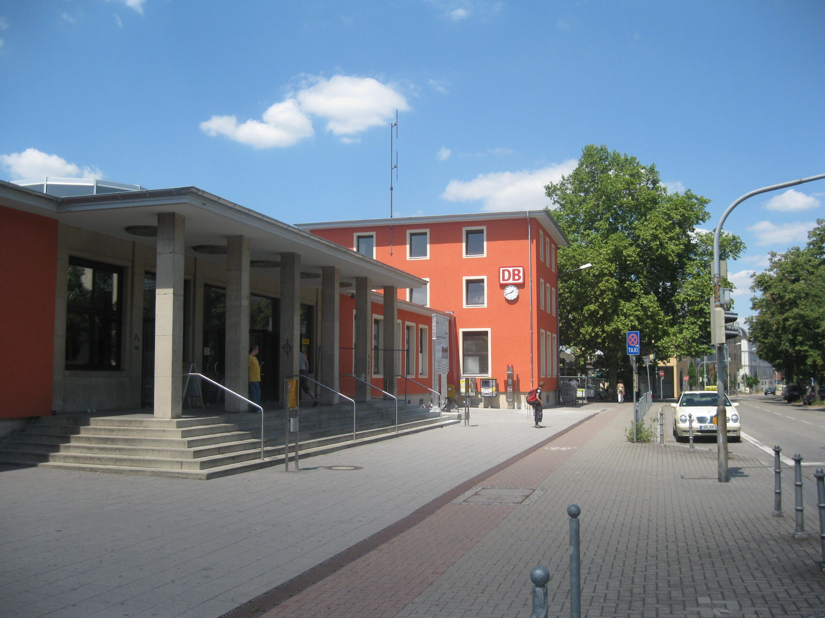 Hauptbahnhof Speyer